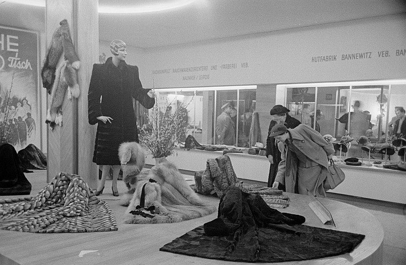 Original image description from the Deutsche FotothekVerschiedene Pelzmäntel am Messestand des VEB Rauchwaren-Zurichterei und -Färberei Naunhof